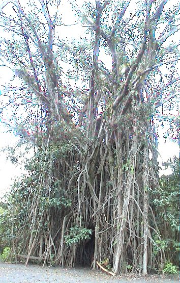 selbst aufgenommen in Vanuatu, Januar 2005 --Plenz 08:43, 30. Mär 2005 (CEST)